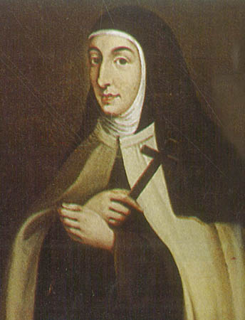 Retrato anónimo de Ana de Jesús, convento de san José de Ávila